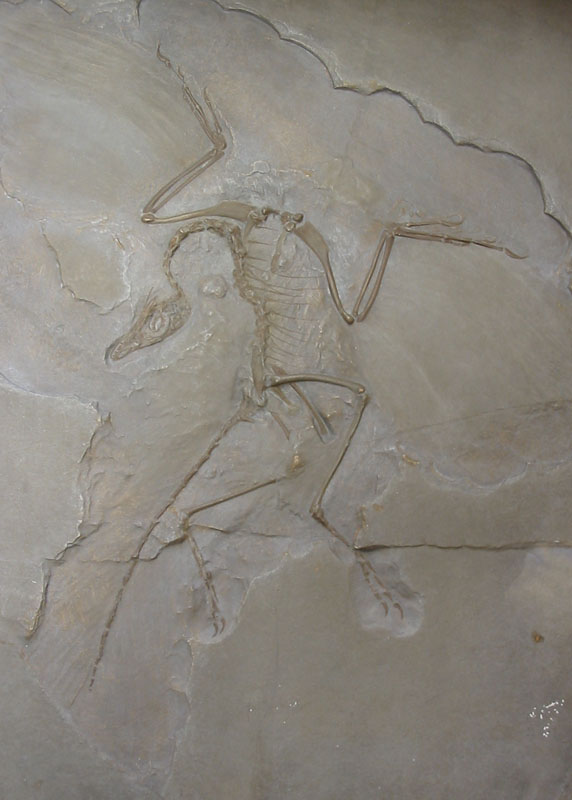 Pildil on Tartu Ülikooli geoloogiamuuseumis asuv kipskoopia Berliinis asuvast originaalist.